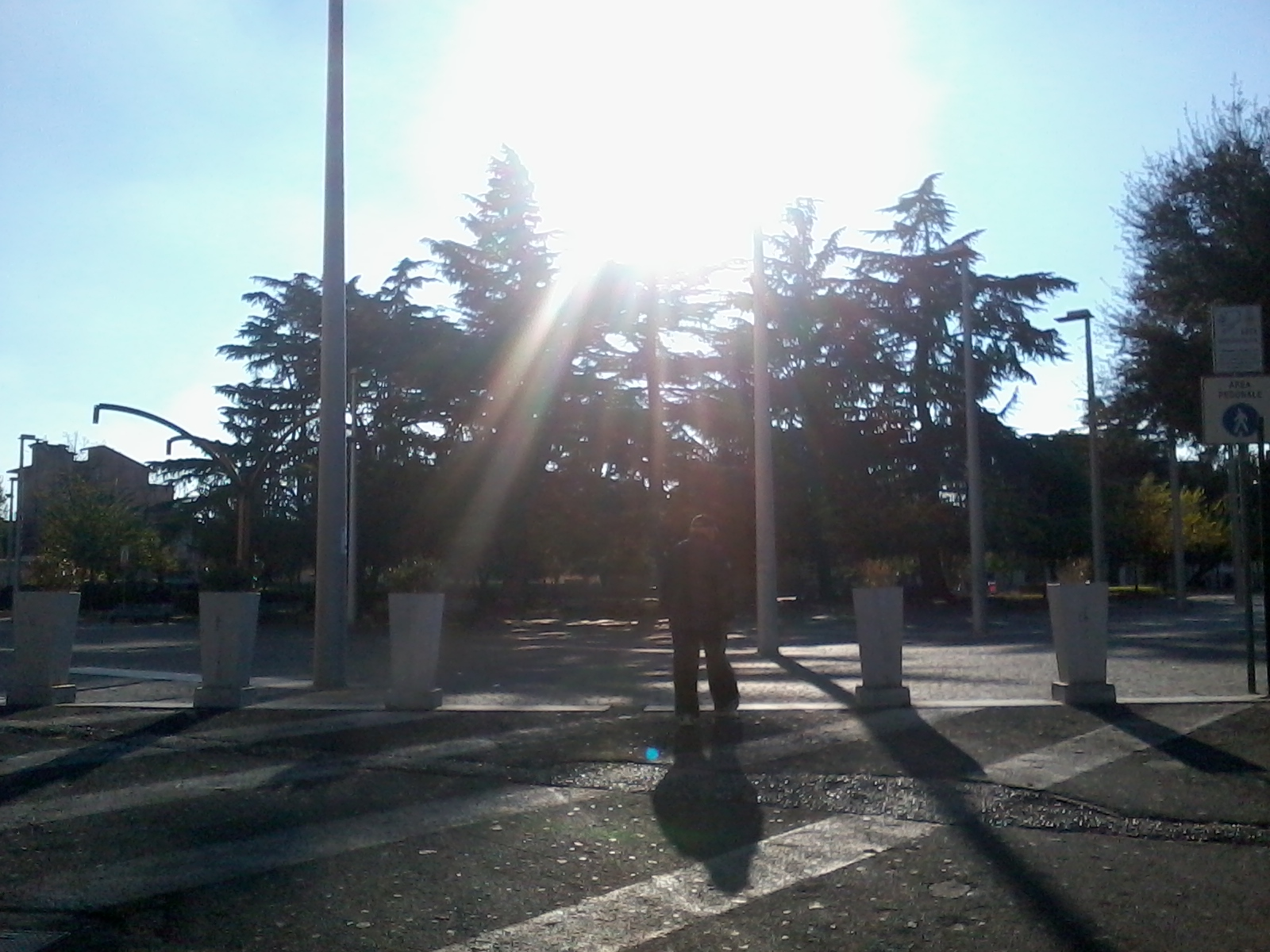 Veduta da via San Pasquale